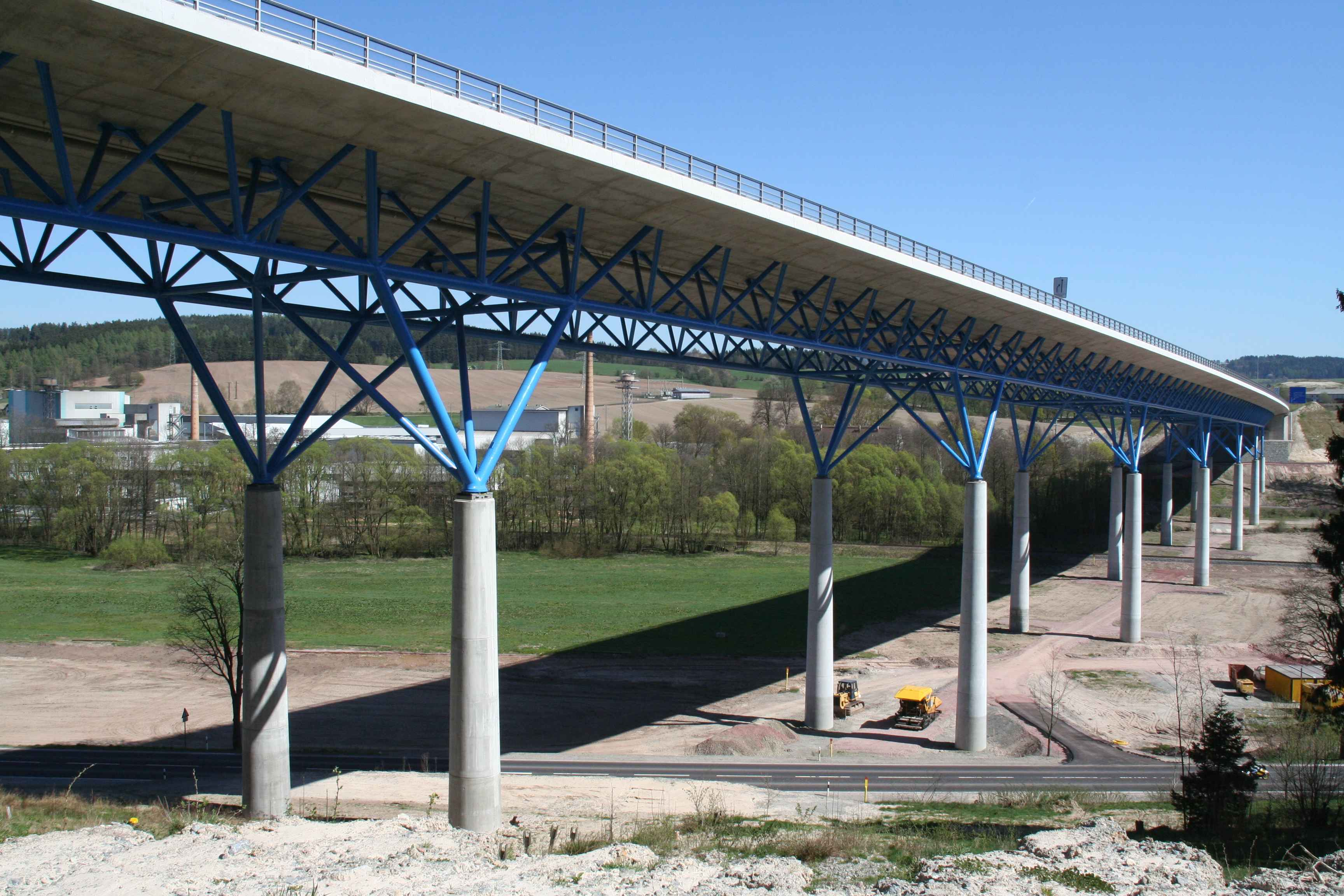 Talbrücke St. Kilian Bundesautobahn A73 bei St. Kilian, Landkreis Hildburghausen